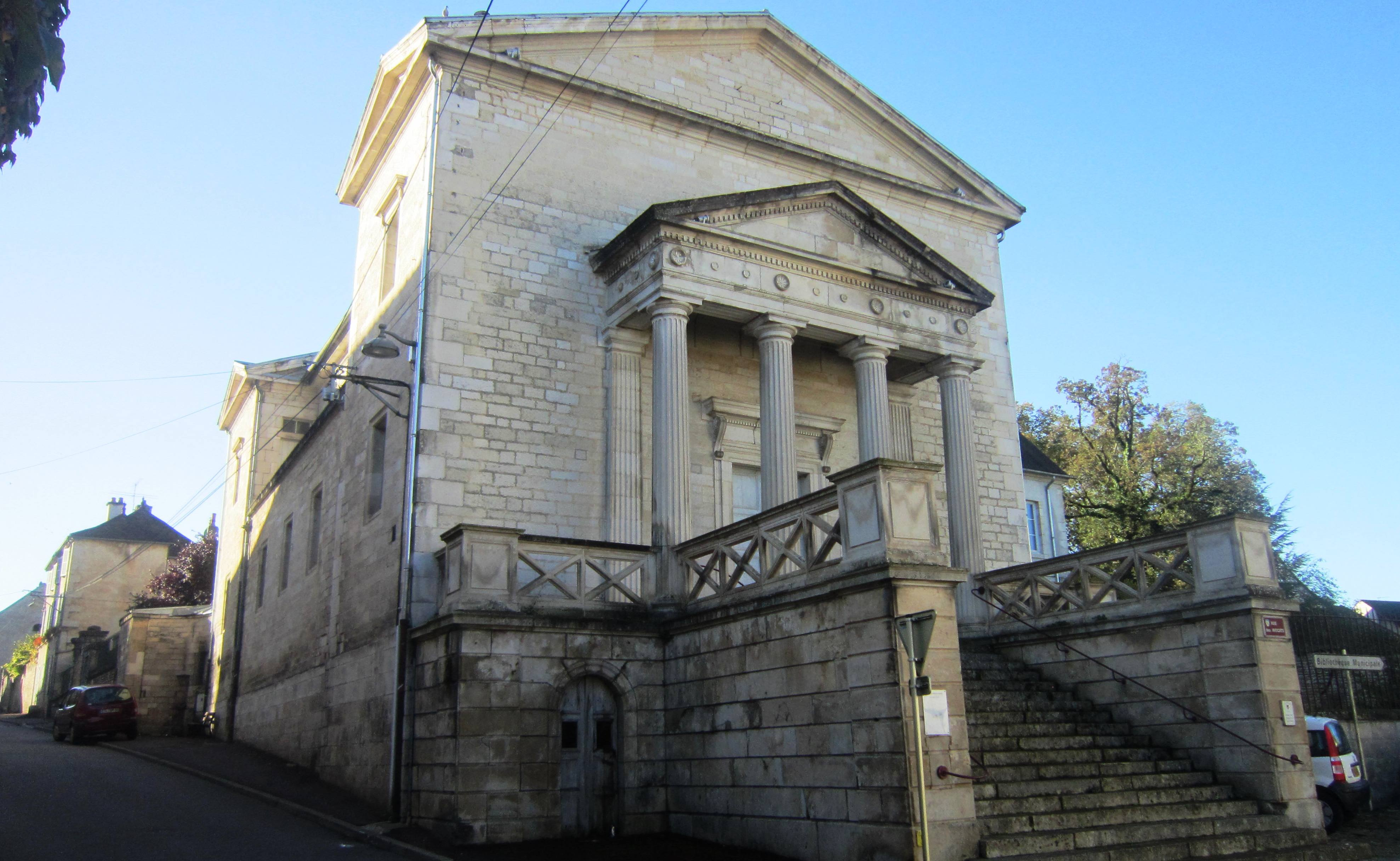 Façade de l'ancien tribunal de Châtillon-sur-Seine et ancien couvent des Carmélites.